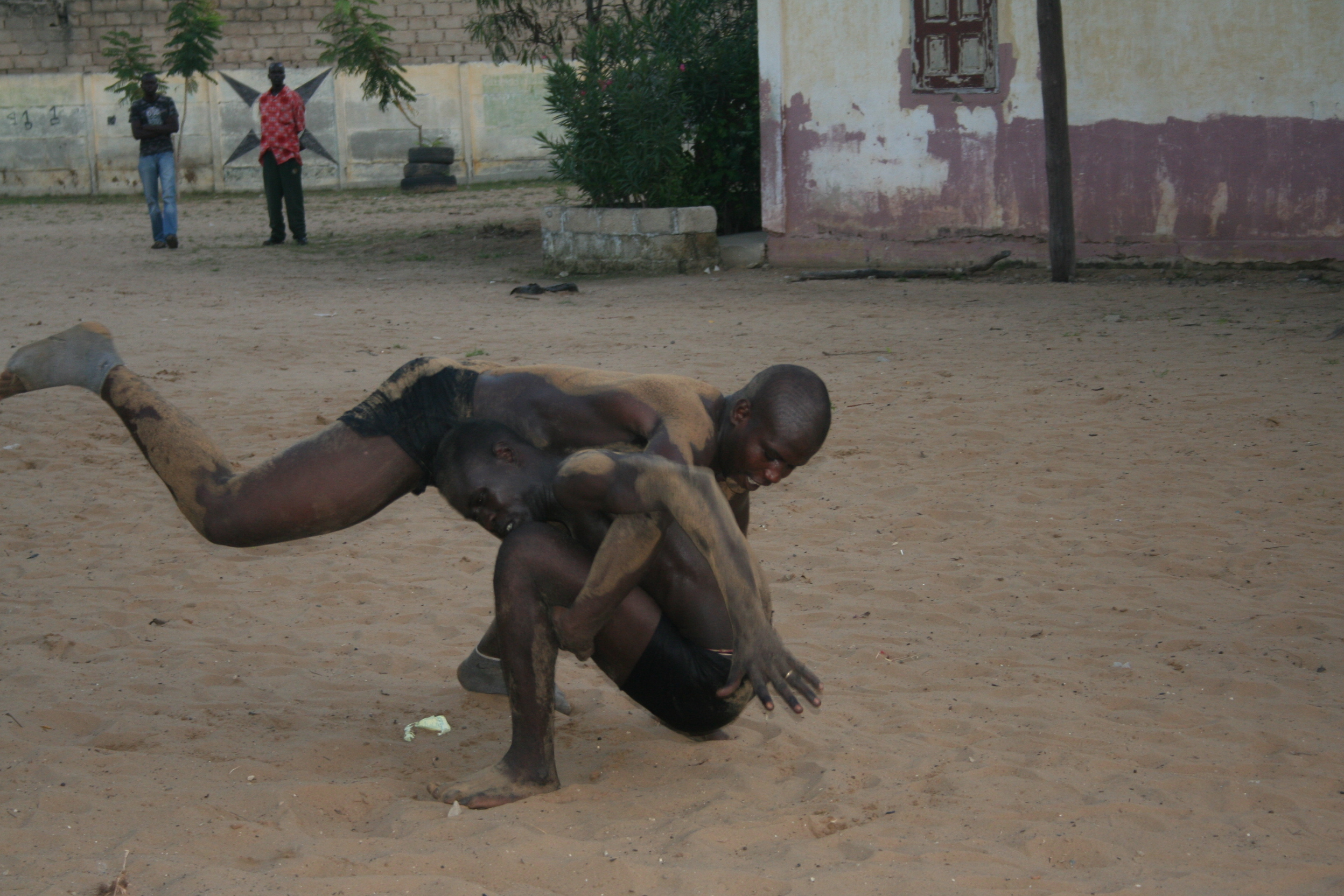 jeu de lutte traditionnelle de chez nous qui est trés développé de chez nous